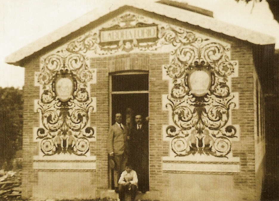 Taller de Daniel Zuloaga en la fábrica de loza "La Segoviana" (Segovia)